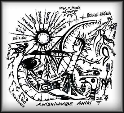 De cosmos van de Ojibweg